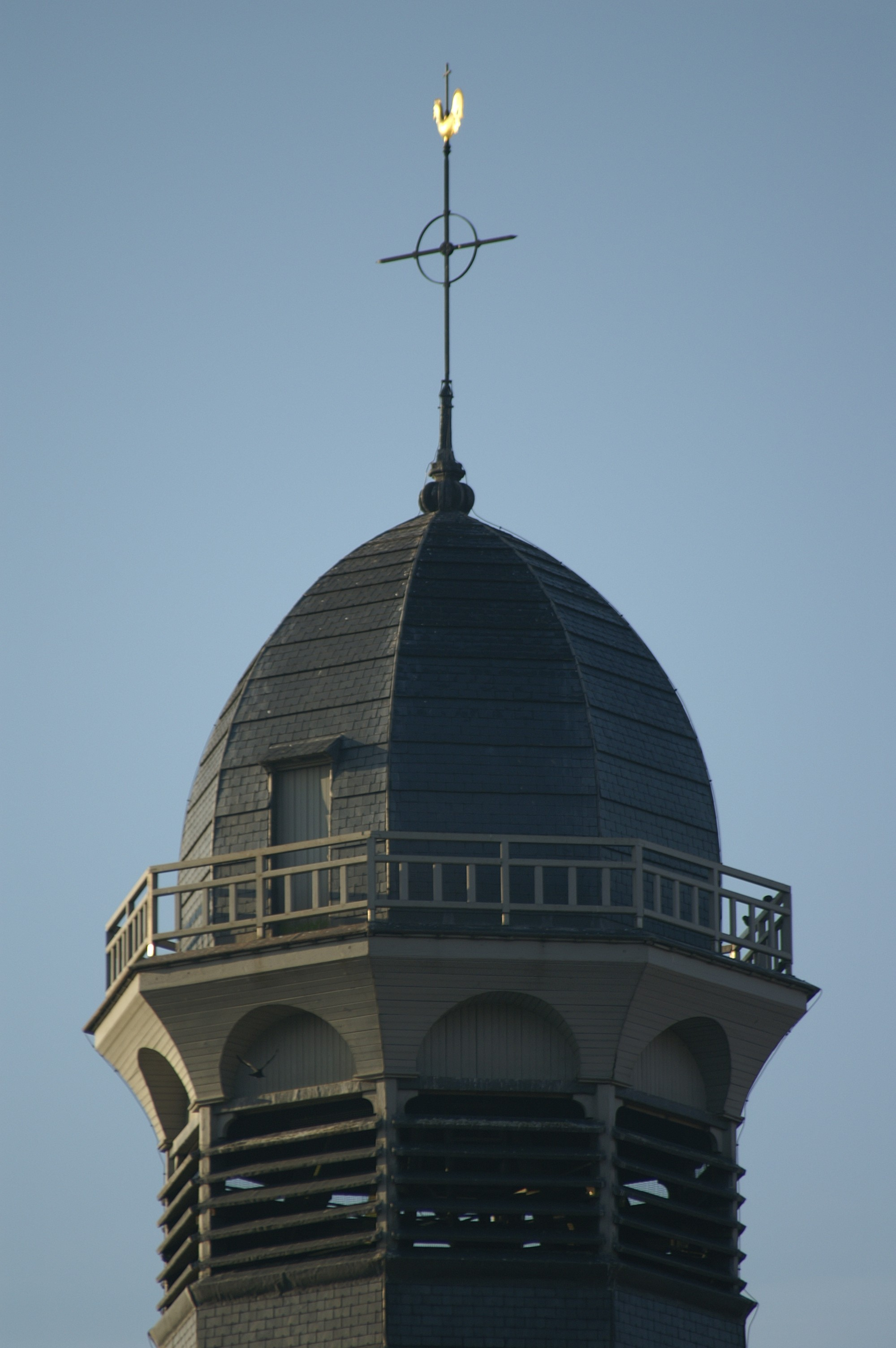 Eigen werk Kerktoren St-Niklaaskerk Mesen, Belgium